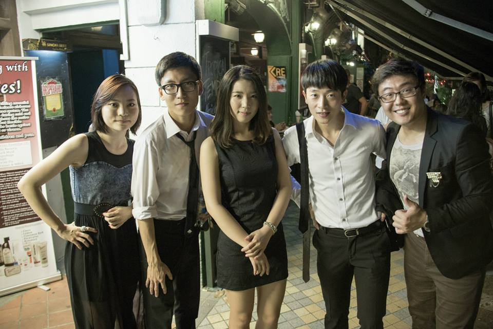 Zenith Vocal Band